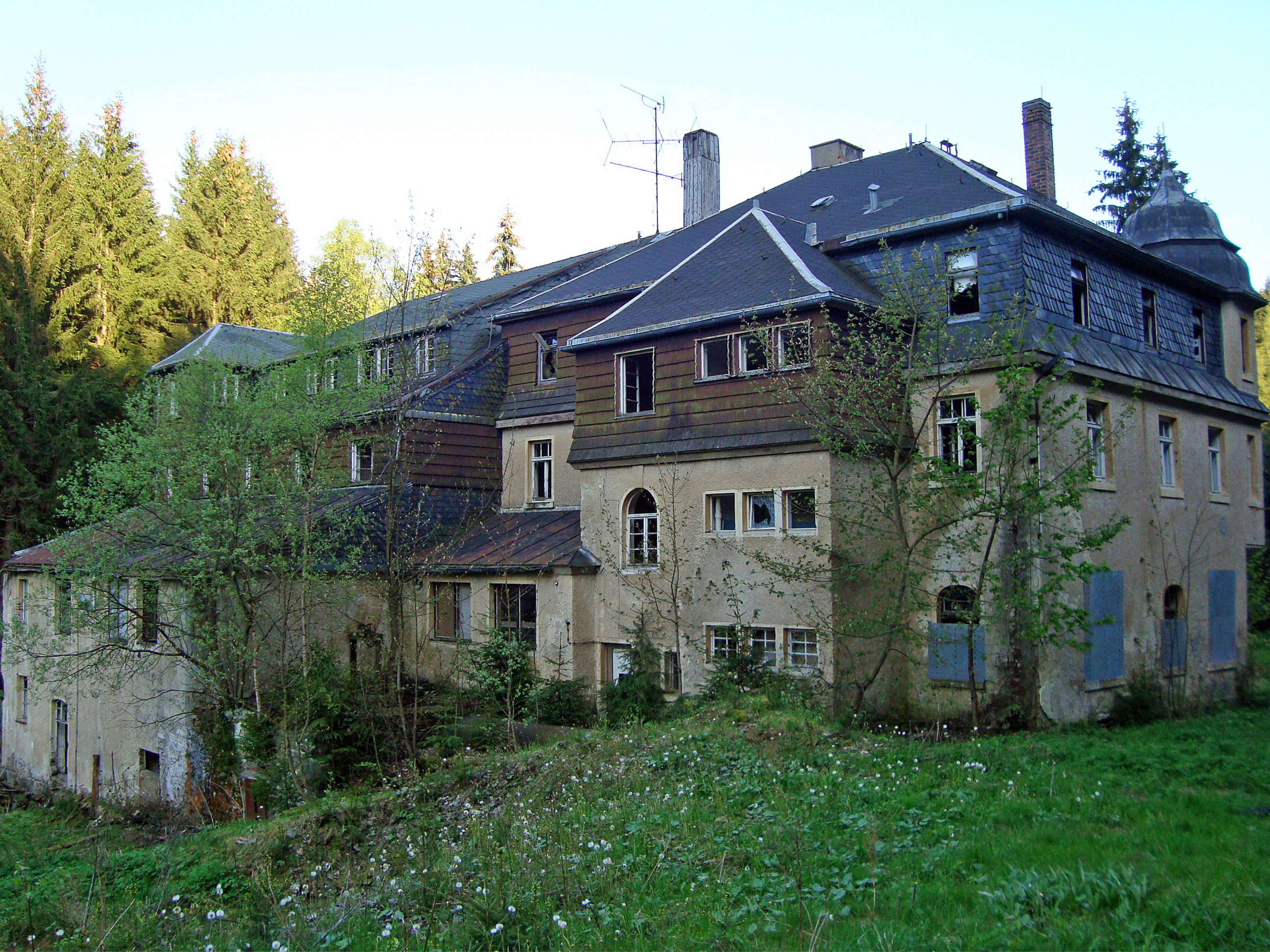 Wolfner Mühle im Erzgebirge